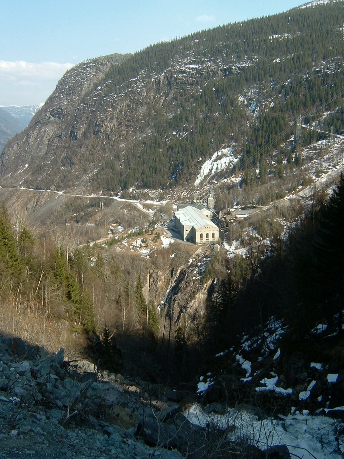 Het Vermork complex bij Rjukan (Noorwegen) - eigen foto, mei 2006